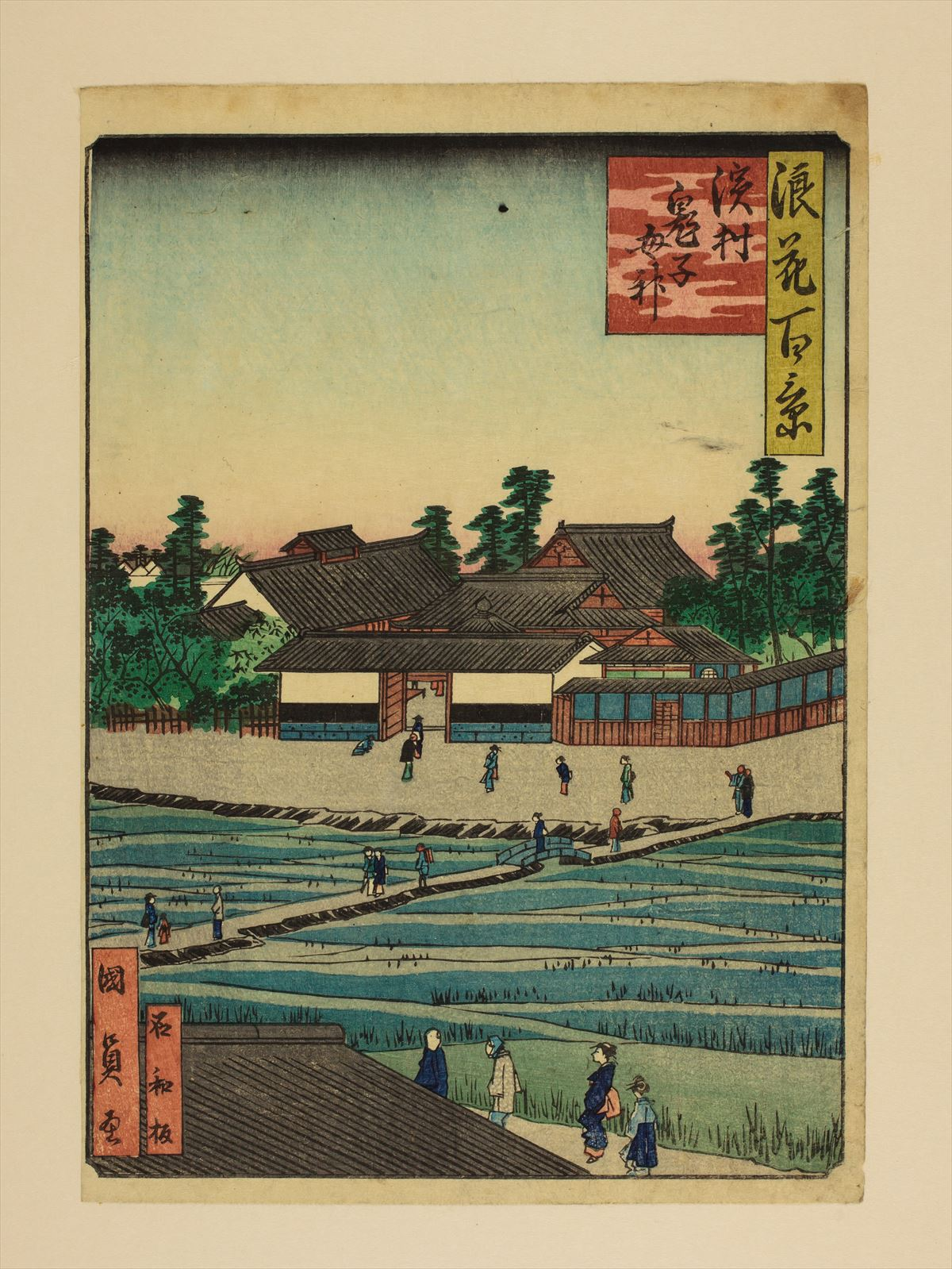 1800年代。歌川國員/画。浪花百景 102枚のうちの1枚。大阪市立中央図書館蔵。